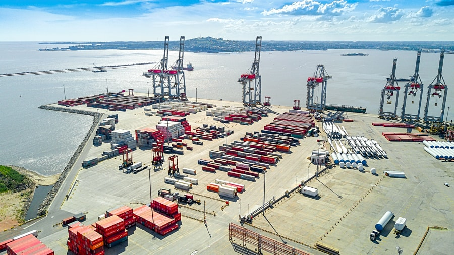 Монтевидеоский порт